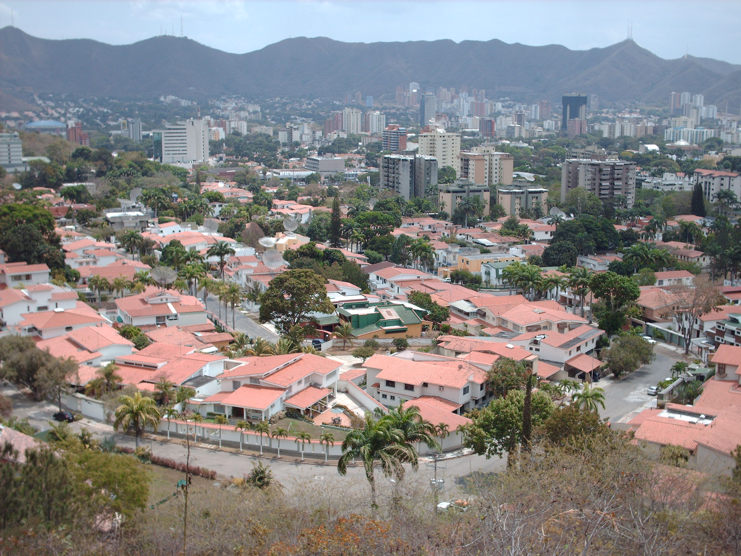 Vista de Prebo desde el casupo